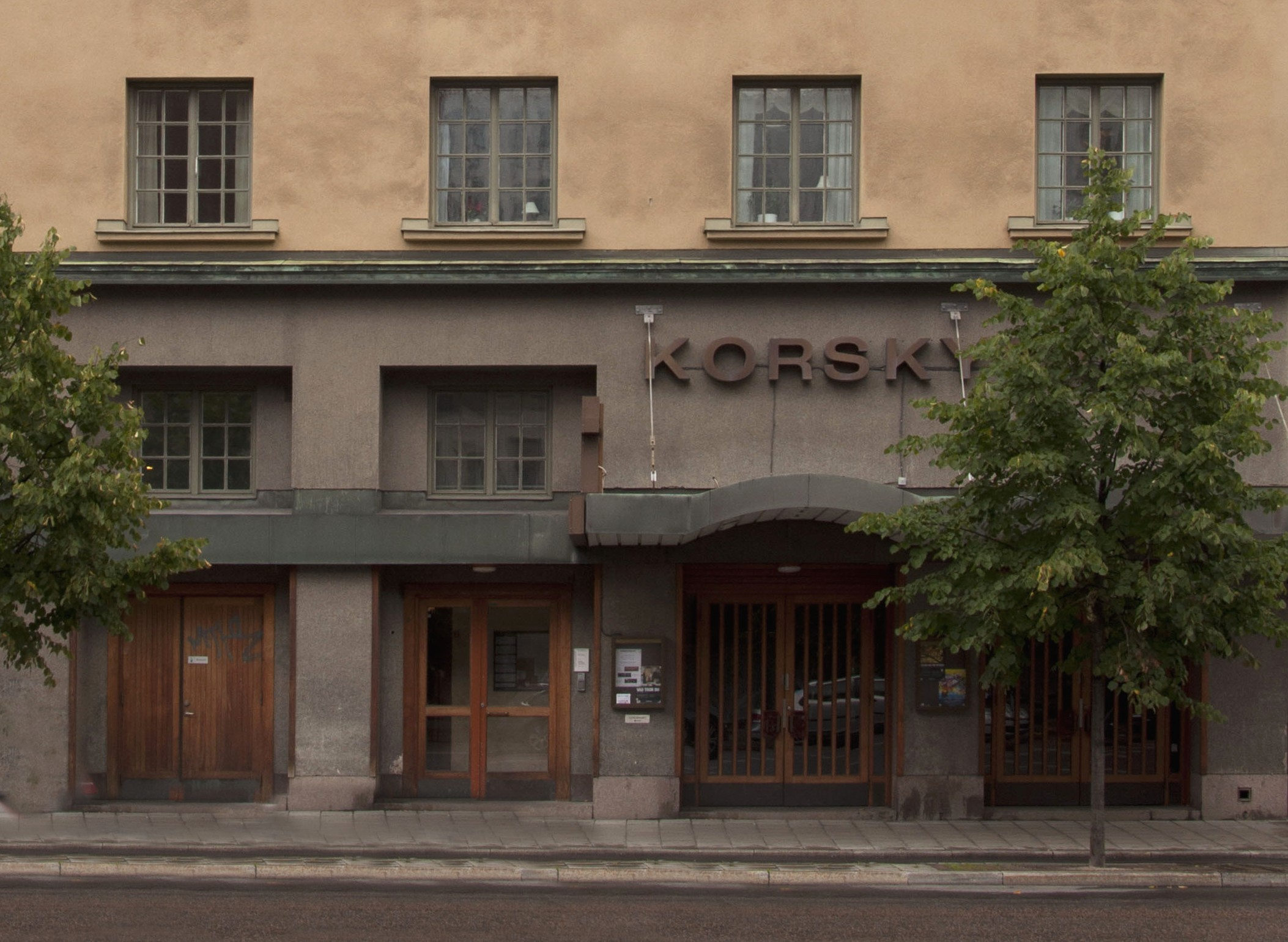 Före detta biograf "Arcadias" entré 2010